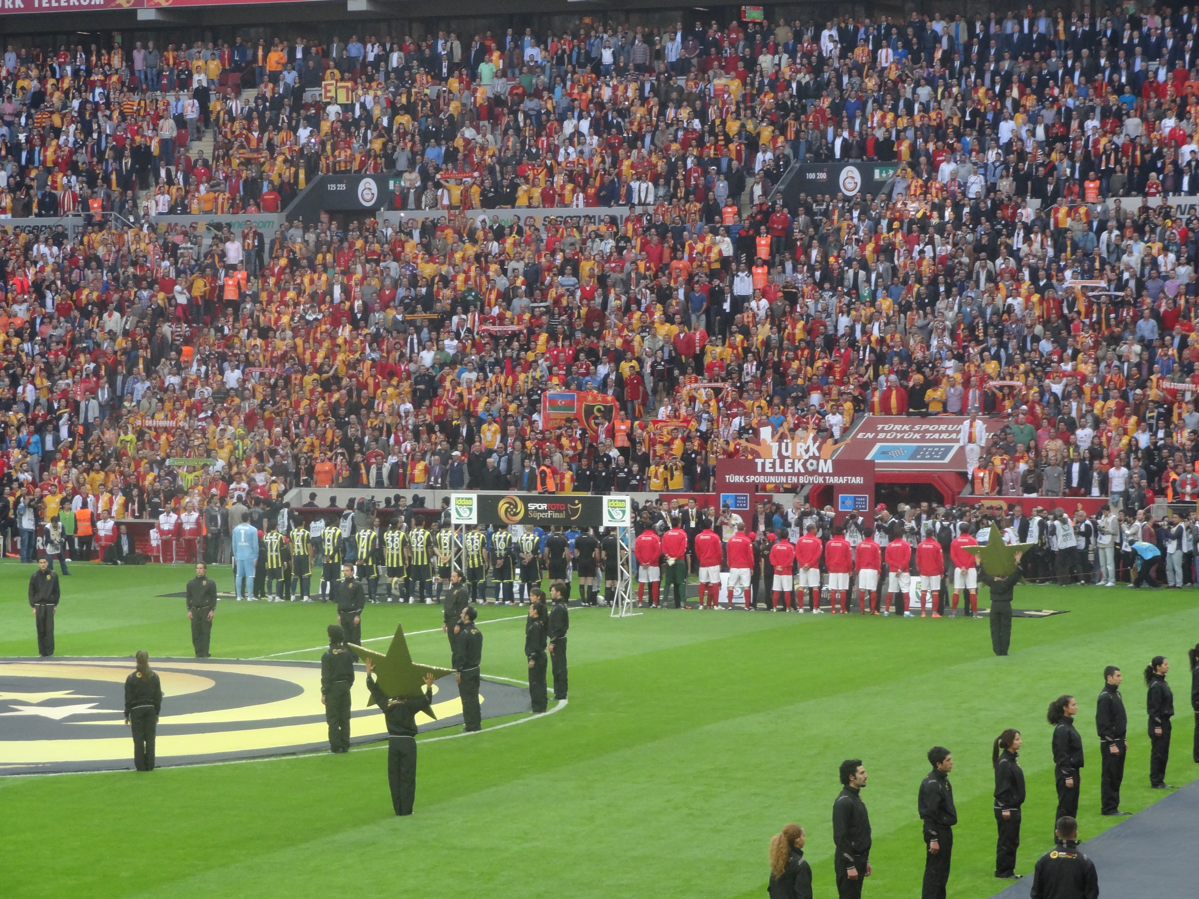 Galatasaray Fenerbahçe maçı öncesi Süper final seramonisi